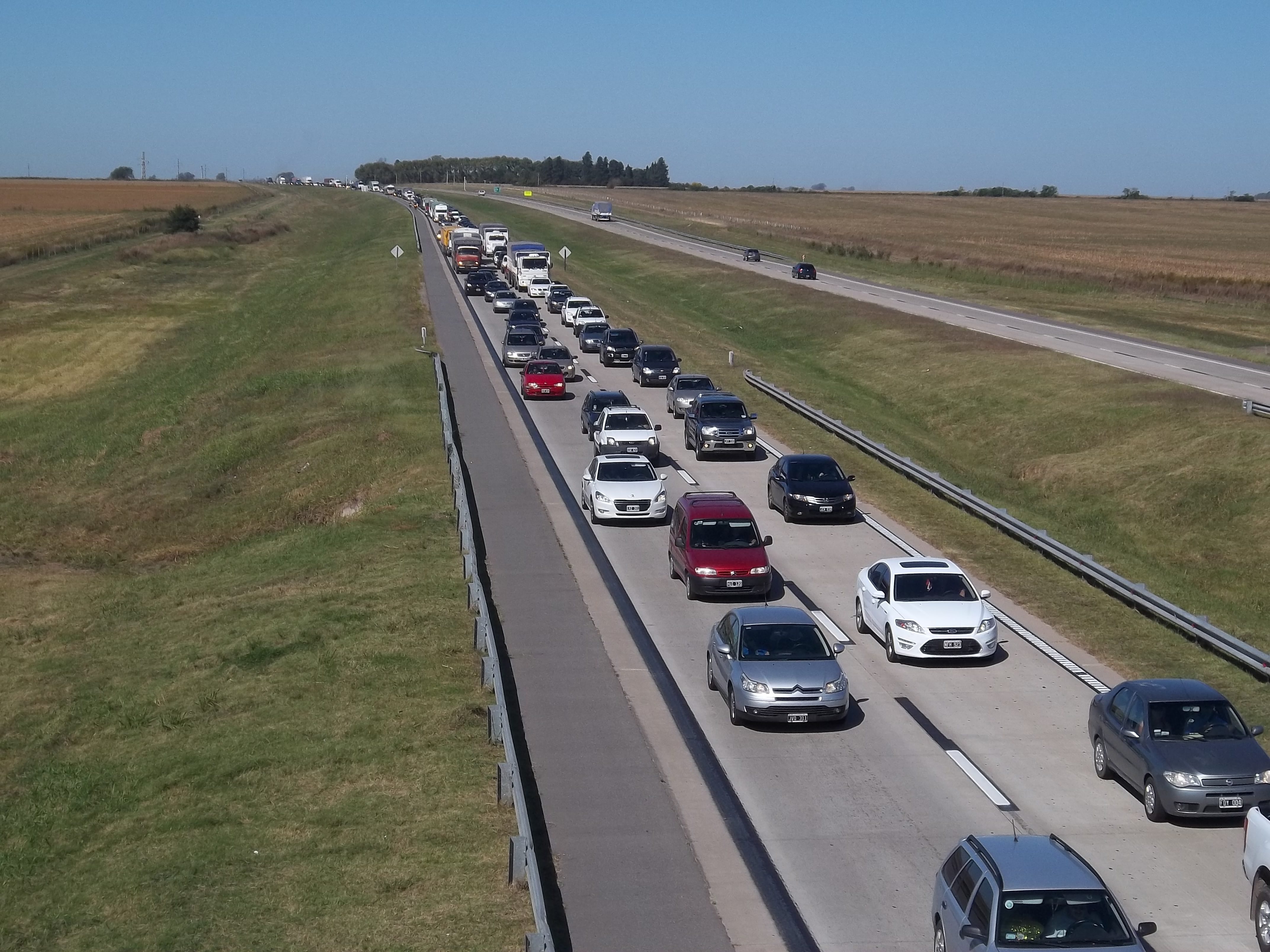 Gran congestión vehicular en la autopista Rosario - Córdoba km 365 perteneciente a la Ruta Nacional 9 durante un fin de semana largo. Cañada de Gómez, departamento Iriondo, provincia de Santa Fe, Argentina.